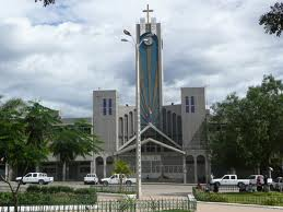 es una reliquia del cantón catamayo